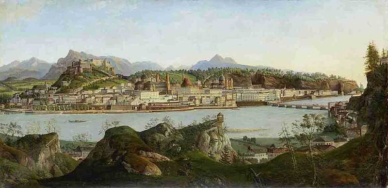 detail